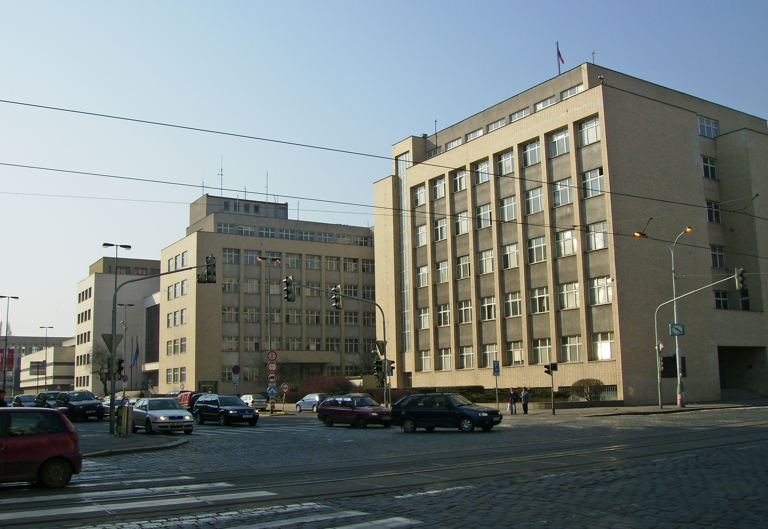 Ministerstvo vnitra ČR - stará budova na Letné.